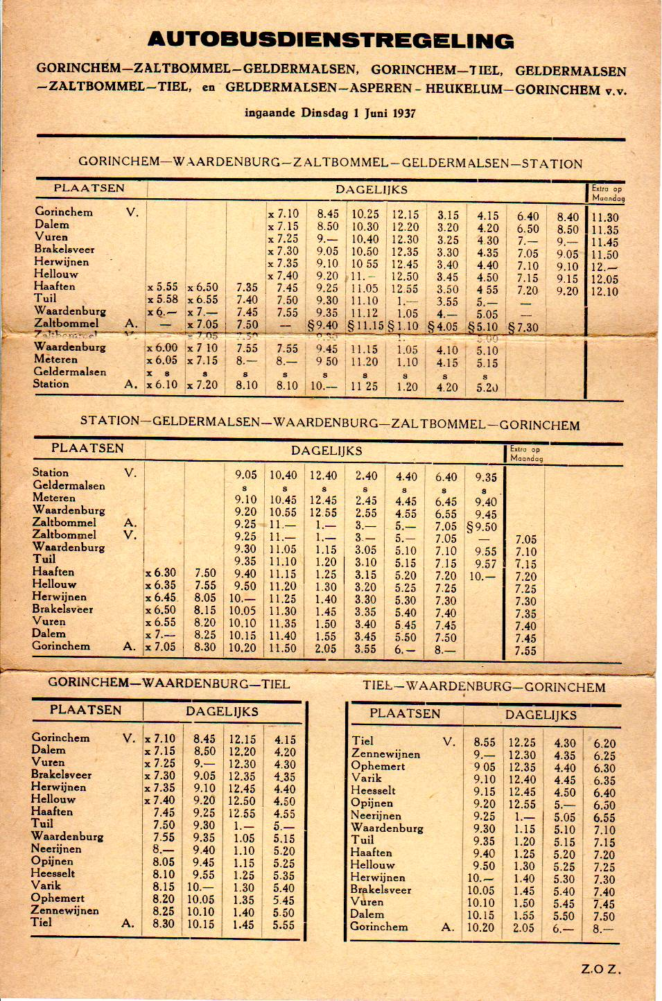 Scan van de dienstregeling van Van Ballegooijen in 1937. Het object, uitgegeven door een instantie, is vanaf 70 jaar na publicatie niet meer auteursrechtelijk beschermd.